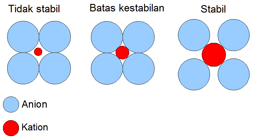 Perbandingan jari-jari kritis